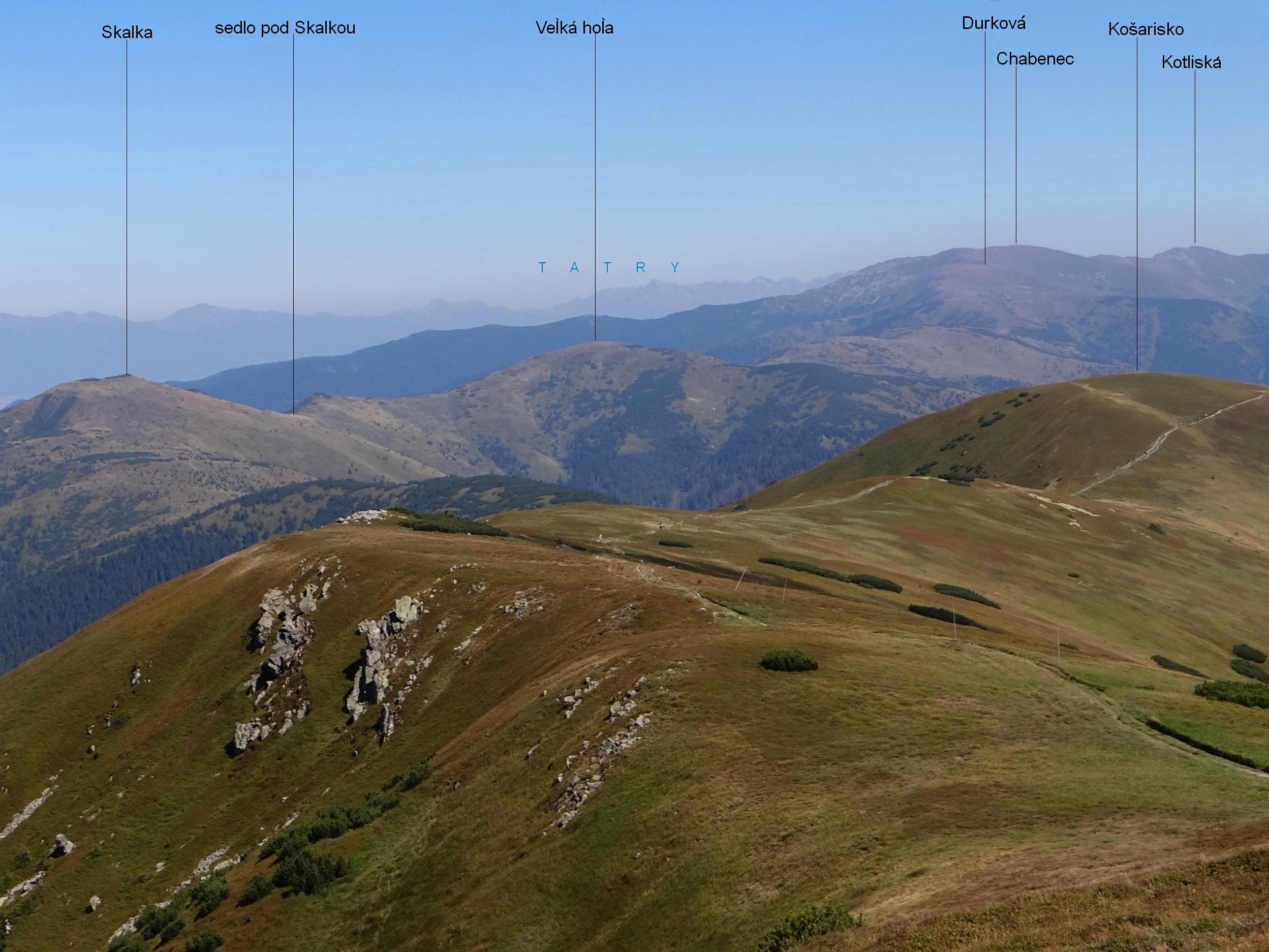 Košarisko (1695 m). View from Veľká Chochuľa